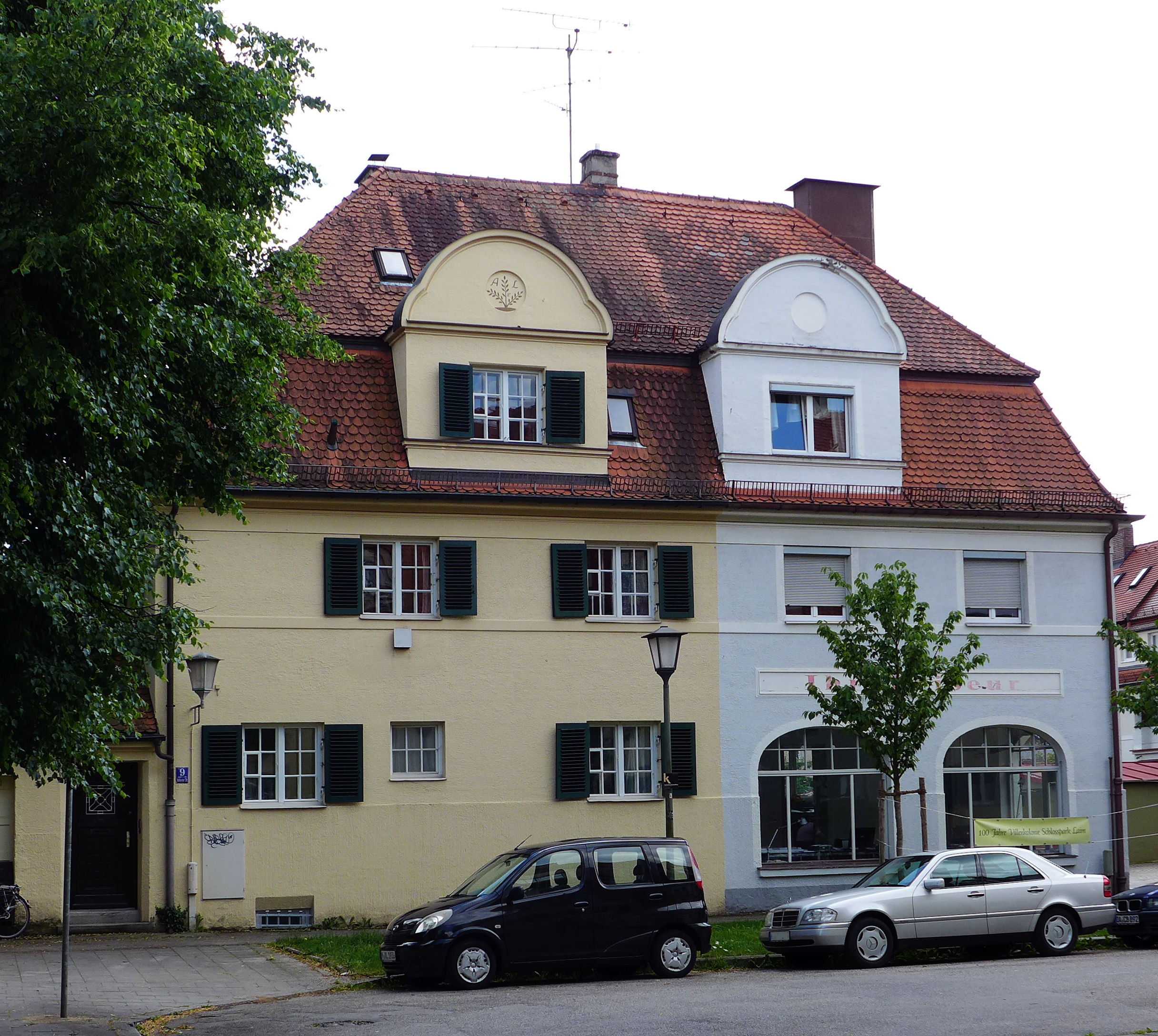 Vohburger Str. 9/11, München